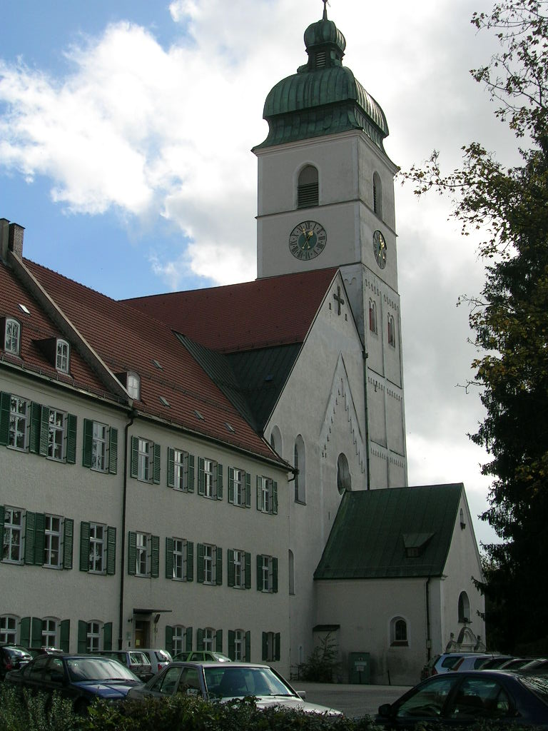 Wallfahrtskirche St. Sebastian in Ebersberg